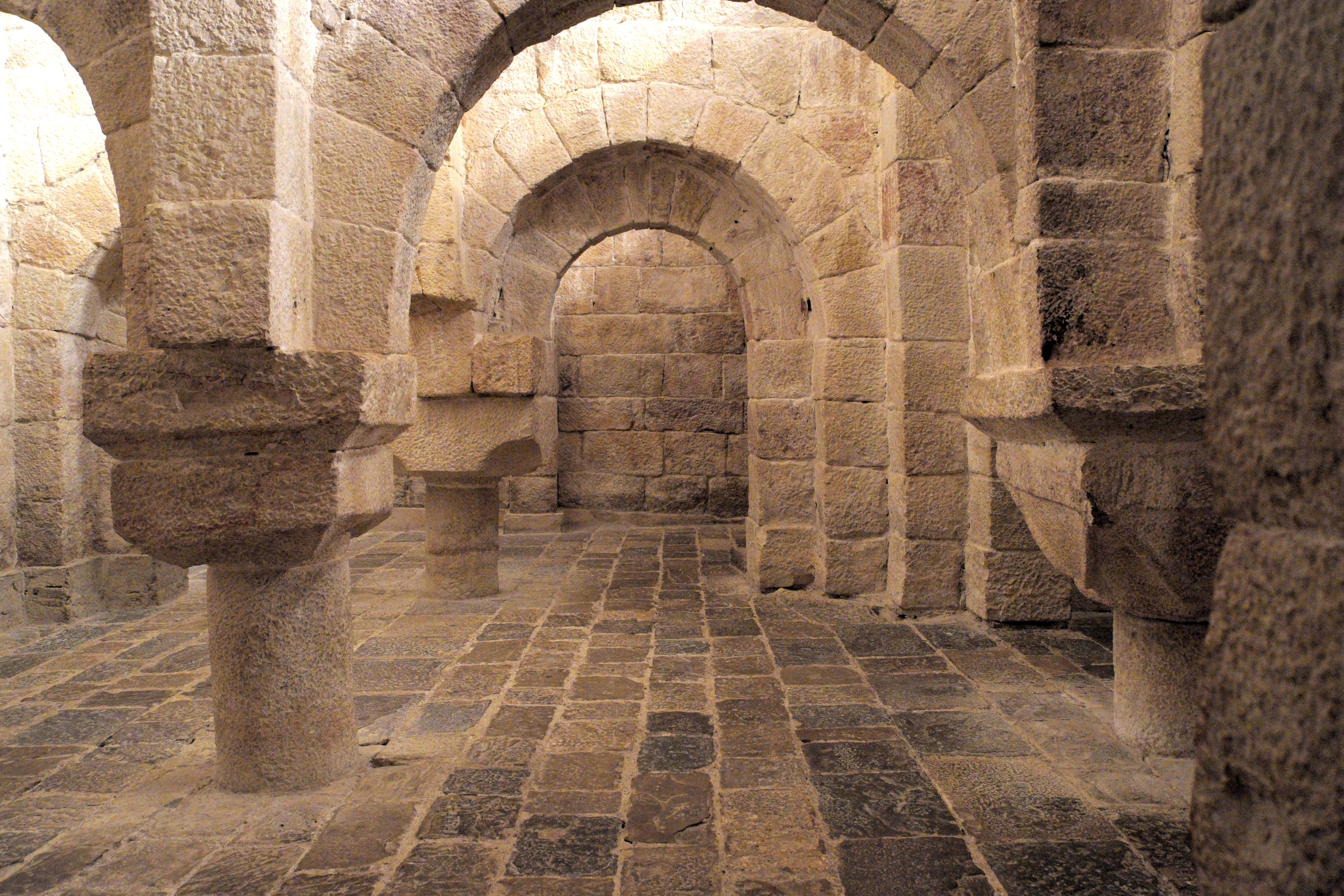 Krypta der Klosterkirche San Salvador de Leyre in Yesa in der Region Navarra (Spanien), Kapitell